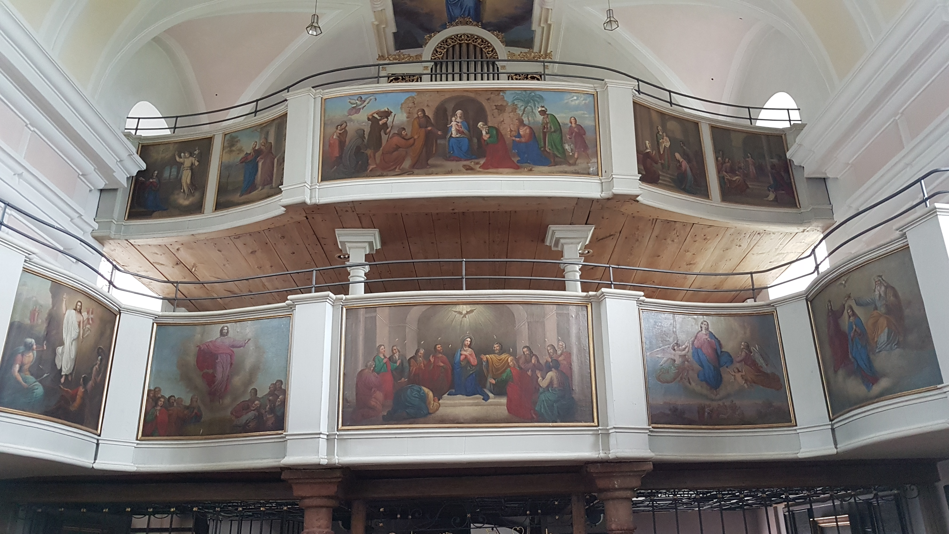 Mariä Heimsuchung (Mühlberg, Waging am See)